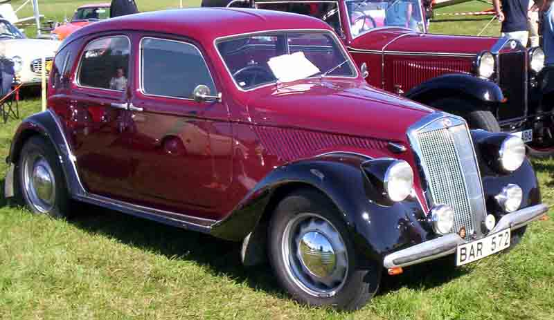 Lancia Aprilia Berlina 1937